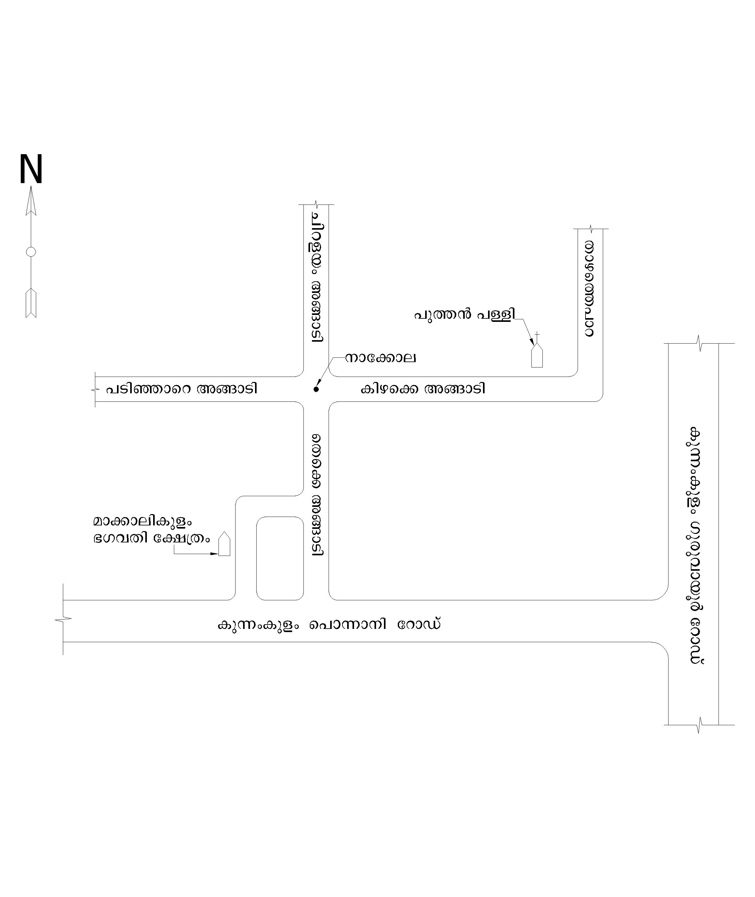 കുന്നംകുളം അങ്ങാടി